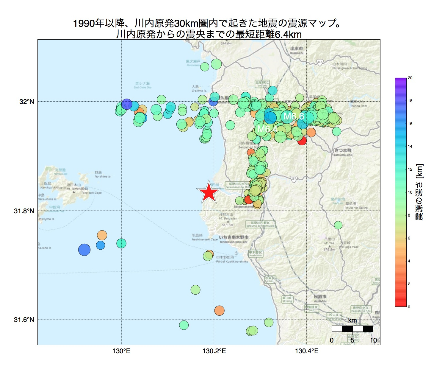 1990年以降に川内原発30km圏内で起きた地震の震源マップ（気象庁のデータより作成） 赤星印が川内原発